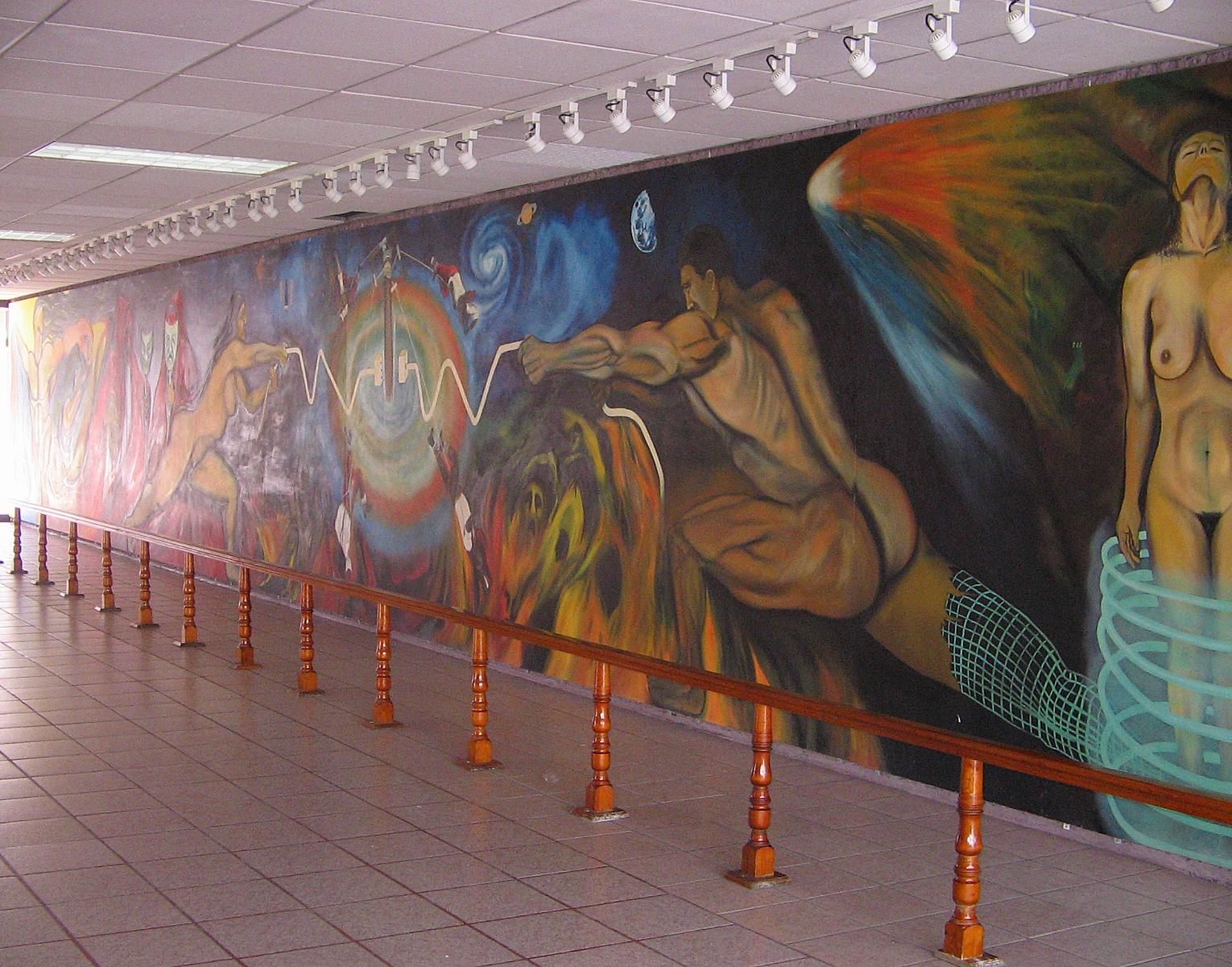 Mural en el edificio de laboratorios de la Escuela Superior de Cómputo (ESCOM)